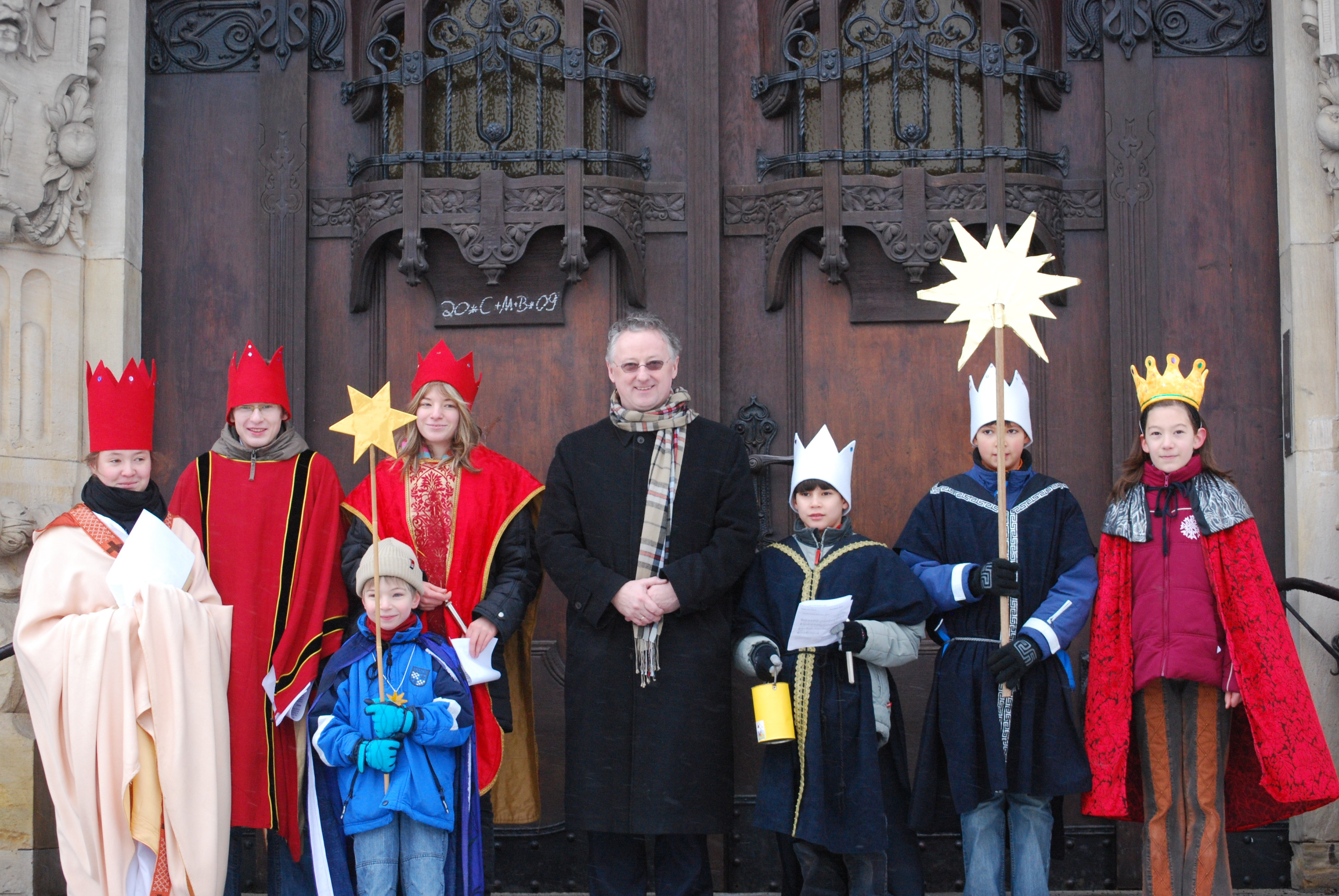 Sternsinger der Katholischen Propsteigemeinde "St. Peter und Paul" Dessau mit dem Oberbürgermeister von Dessau-Roßlau, Klemens Koschig, vor dem Rathaus